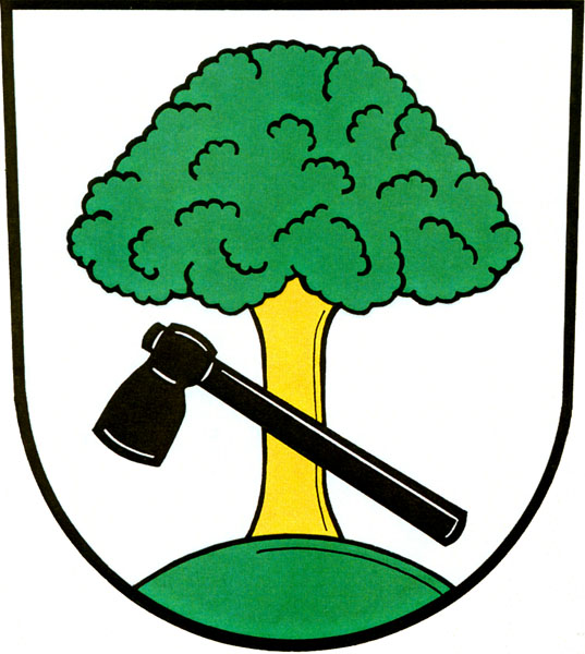 Znak obce Vápenná